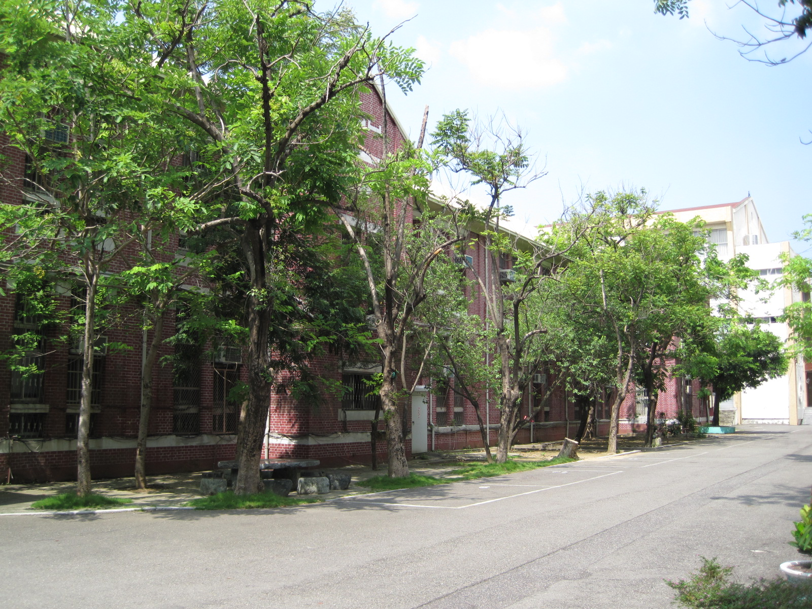 臺南市原南門尋常小學校舍（建興國中）左邊